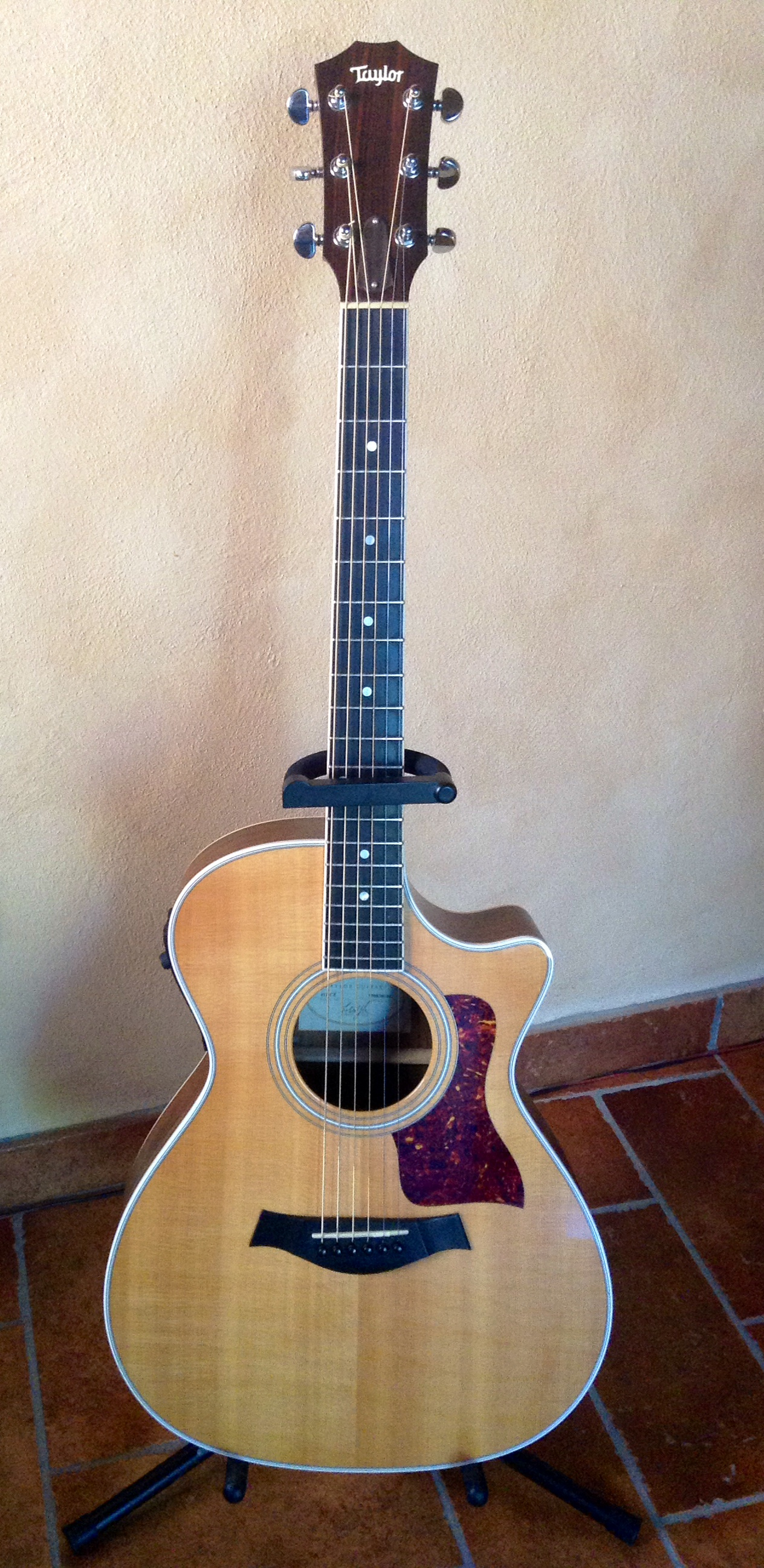 Chitarra folk Taylor 412ce